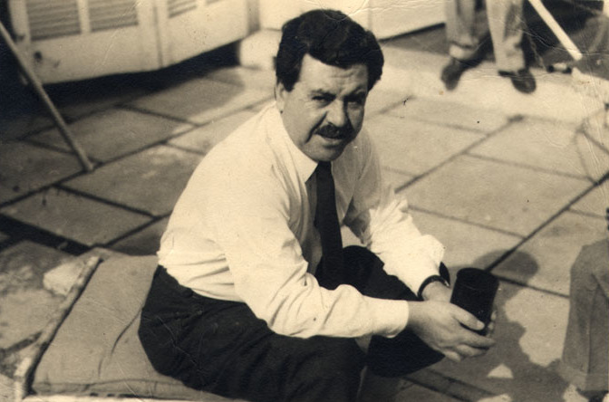 Luis Hernández Parker, Periodista (1954).